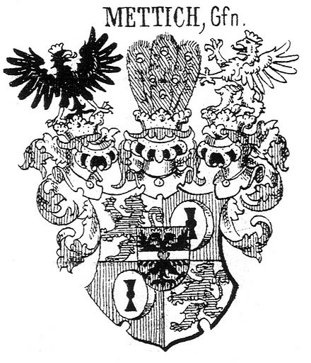 Wappen der Grafen von Mettich. Quadriert mit rotem Herzschild, in welchem ein schwarzer Doppeladler, überdeckt von silbernem, mit rotem Herzen belegten Balken. 1 u. 4 in Silber ein rechts gekehrter blauer Löwe. 2 u. 3 in Rot ein silberner Mühlstein. Drei gekrönte Helme mit mit rot-silbernen Decken. I. schwarzer gekrönter Adler auf der Krone, links gekehrt; II. Pfauenschweif; III. links gekehrter silberner Greif auf der Krone (ex cop. dipl.).